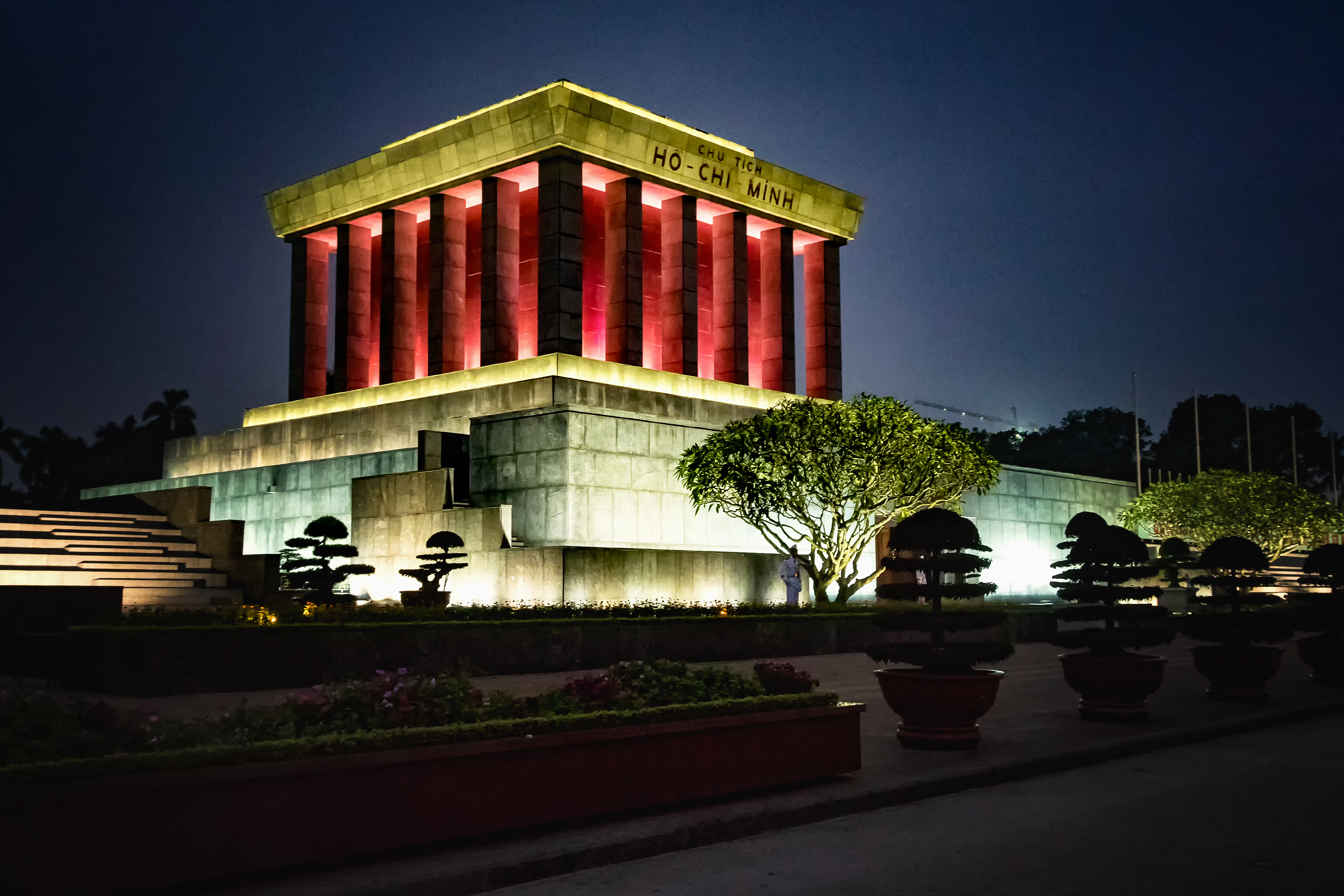 Lăng Chủ tịch Hồ Chí Minh ở Hà Nội, Việt Nam.